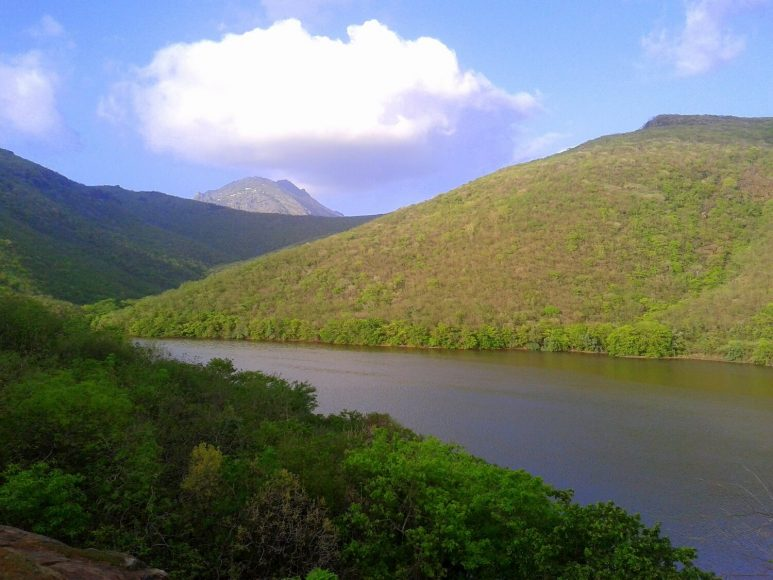 ગુજરાતી: આ સુંદર દ્રશ્ય વિલંગન ડેમ નું છે.જે જૂનાગઢ ગુજરાત માં સ્થિત છે ,આ શહેર ને હકીકત માં પ્રકૃતિ ની મહેરબાની મળી છે